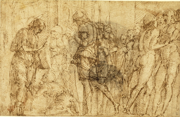 Preparatory drawing